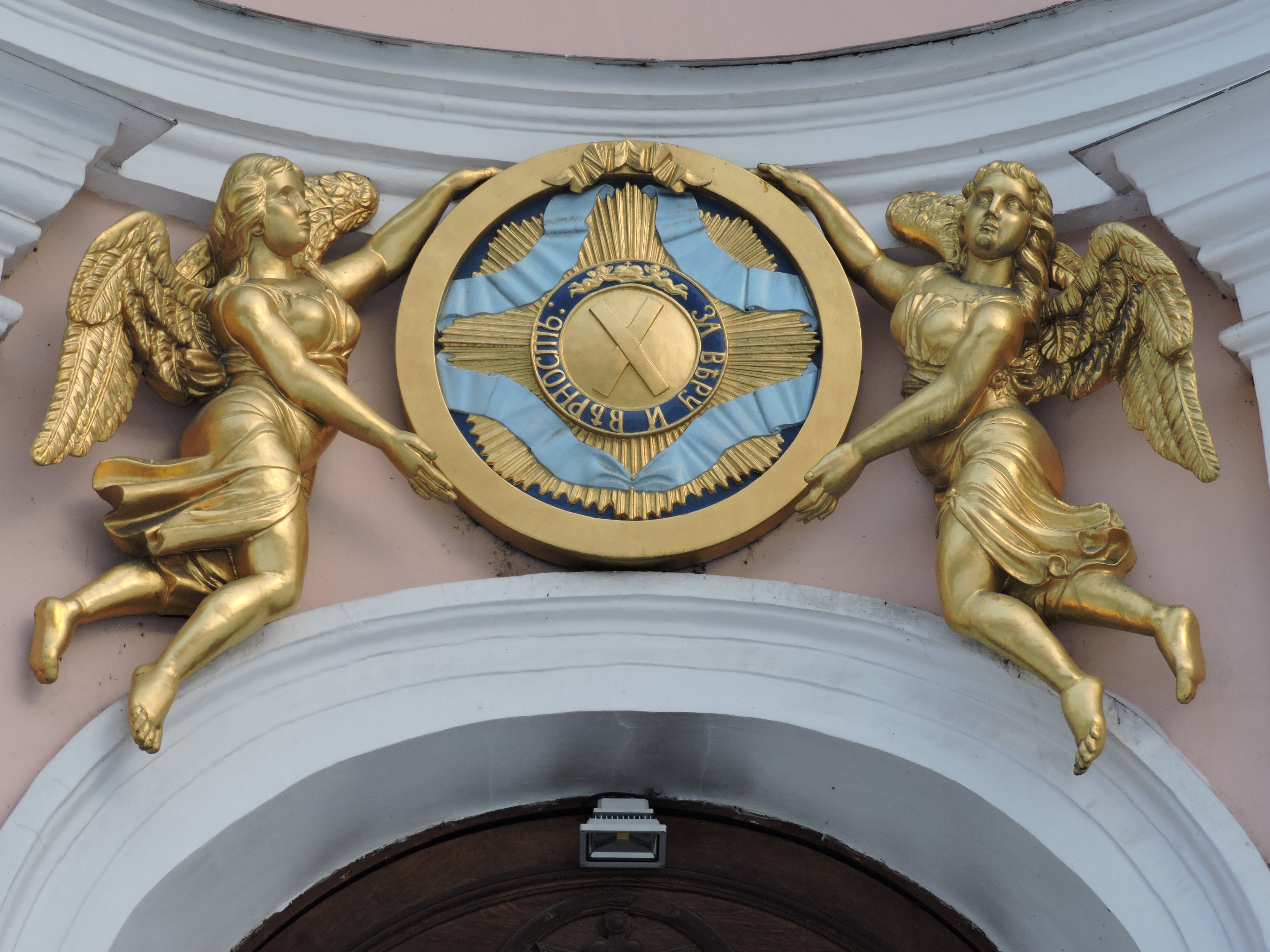 Ангелы Андреевского собора держат знаки ордена